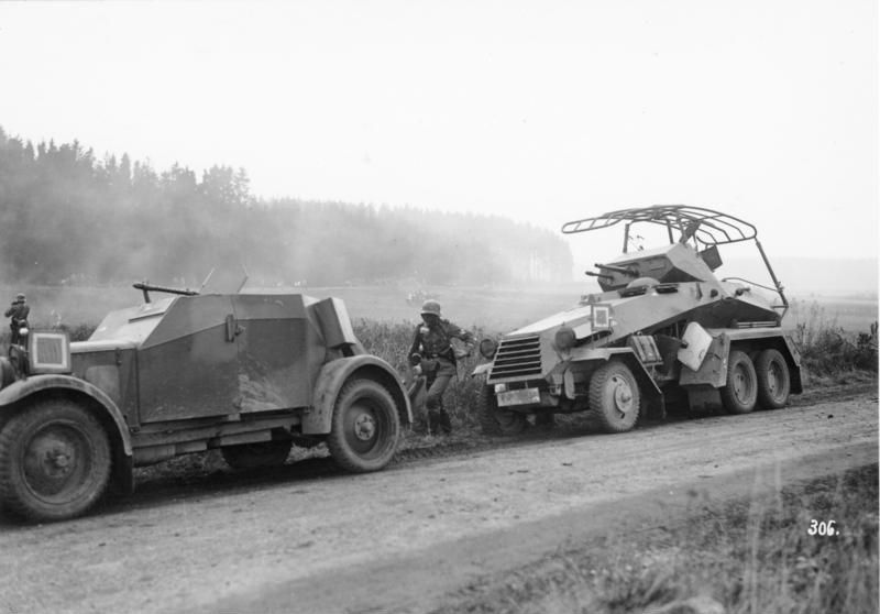 Große Herbstübung 1936 Gruppenkommando 2 (V. und IX.A.K.), Leichter und schwerer Panzerspähwagen bei Gasalarm